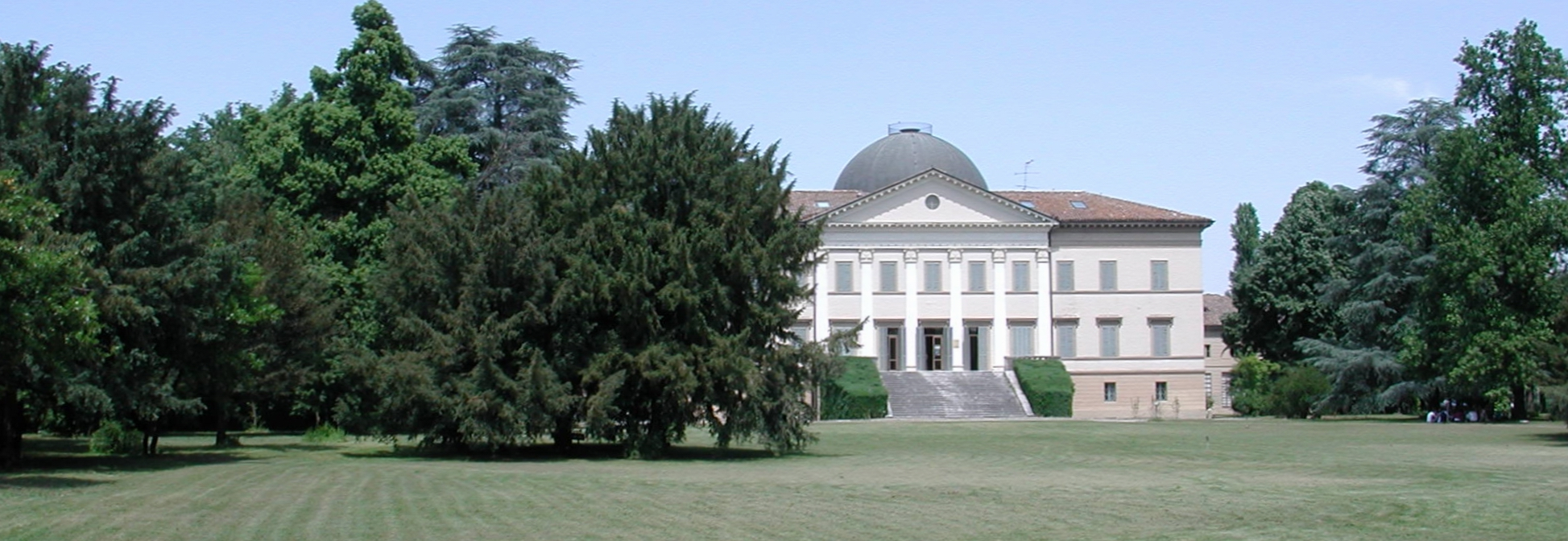 Reggio Emilia, Italy Coviolo Villa Levi